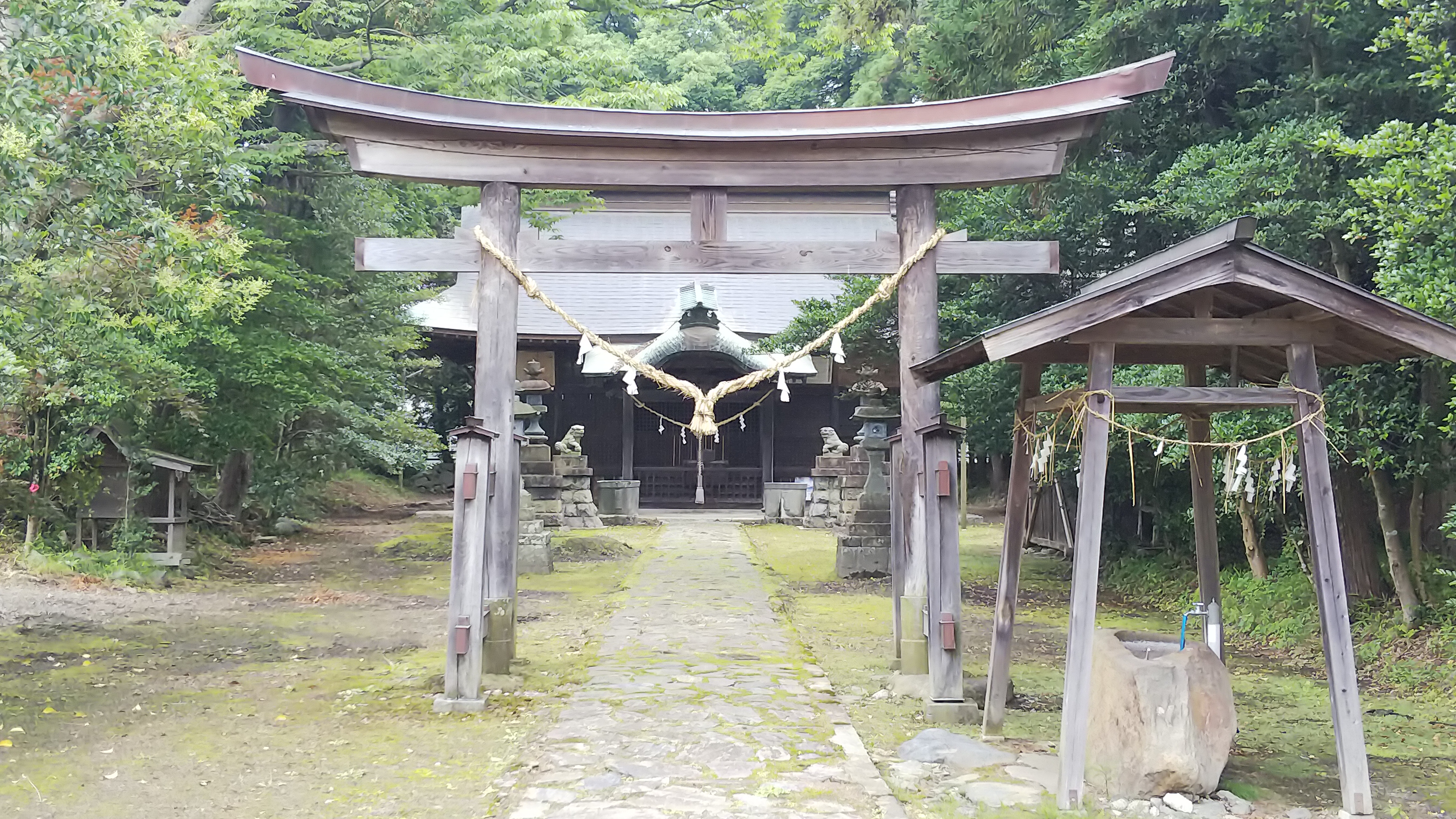 薩都神社鳥居